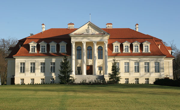 Pałac w Winnej Górze, elewacja frontowa.